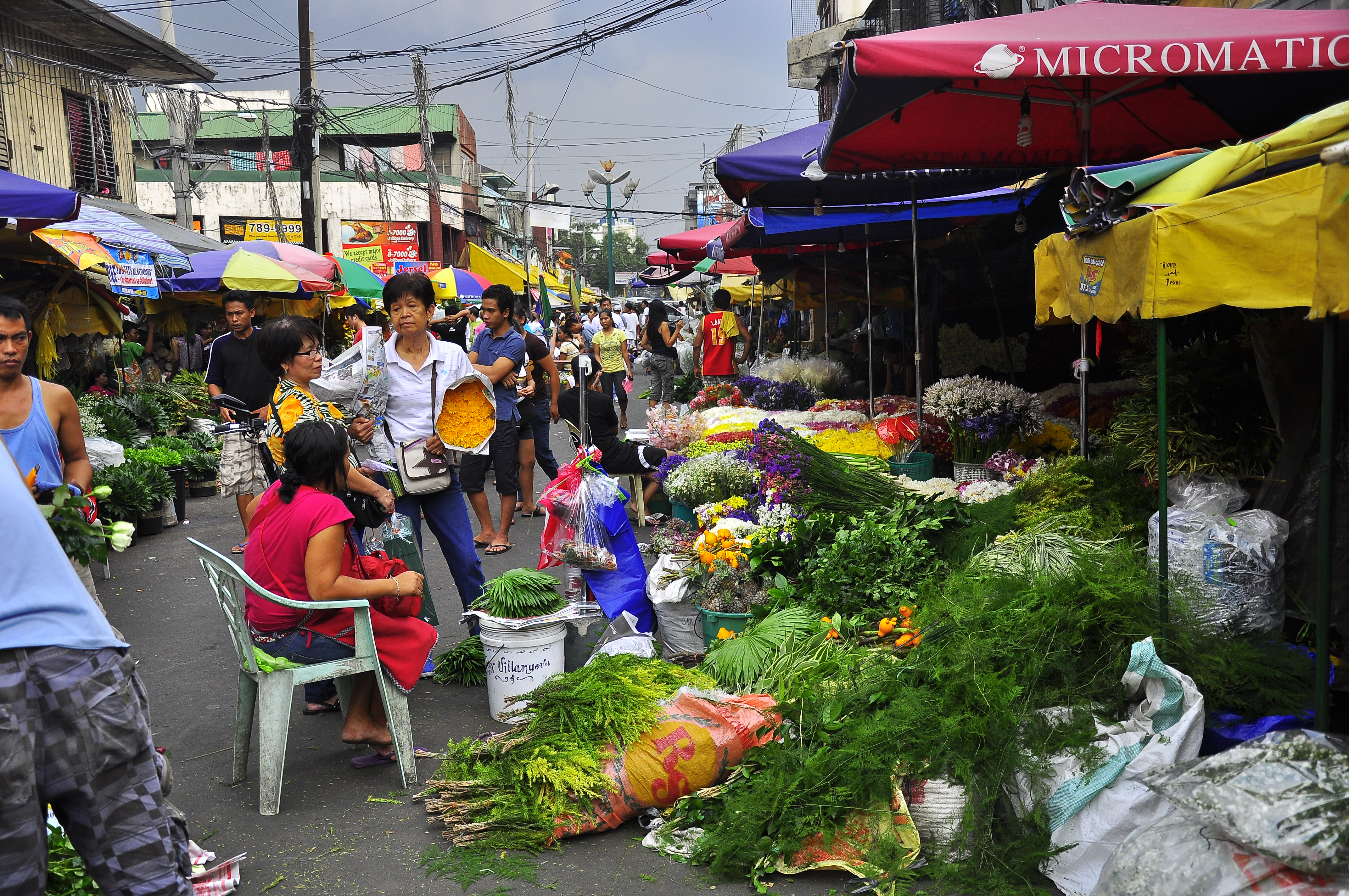 Dangwa flower market in Manila, Philippines